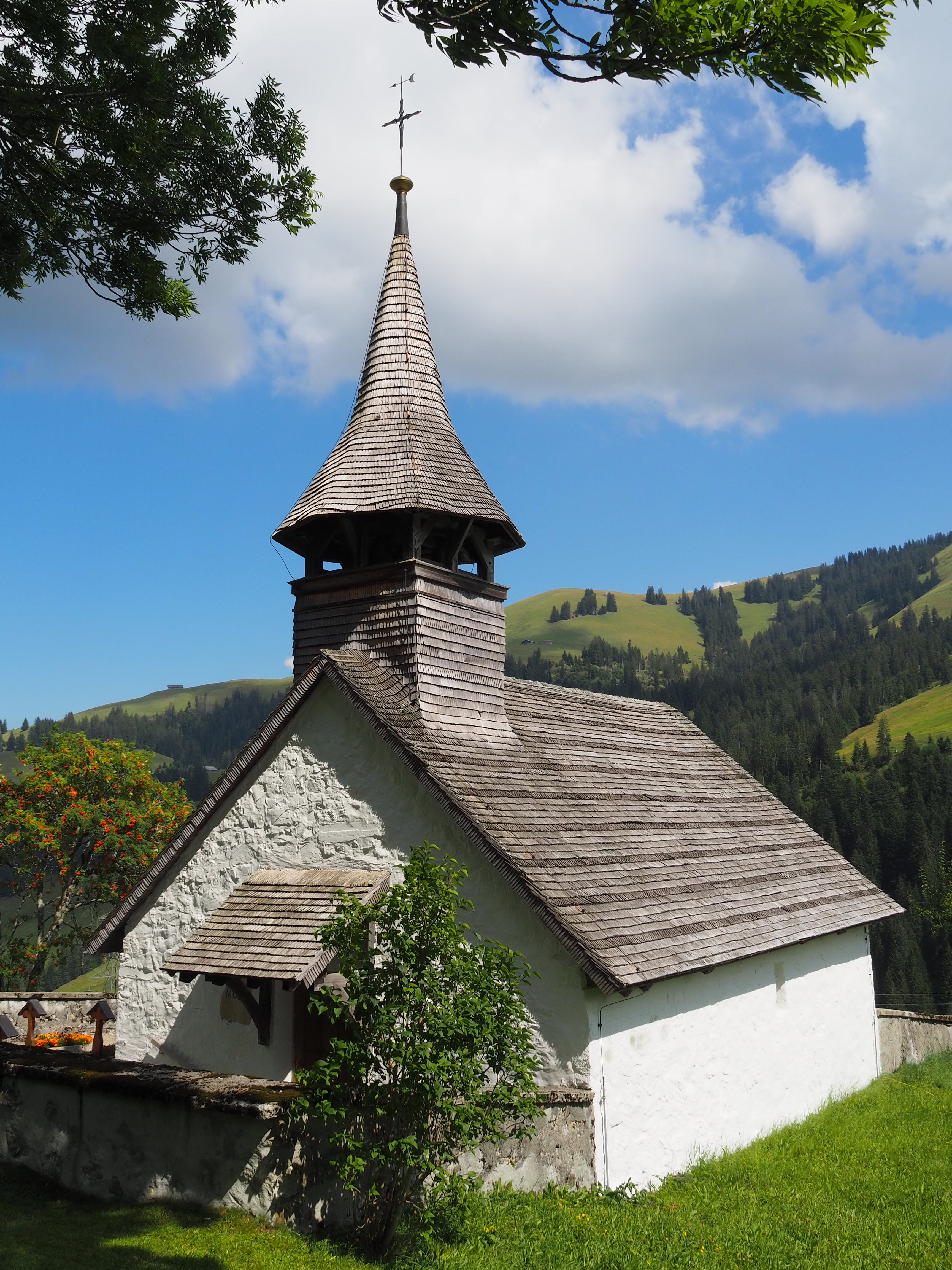 Kirhe von 1612 in Abländschen, Gemeinde Saanen BE, Schweiz